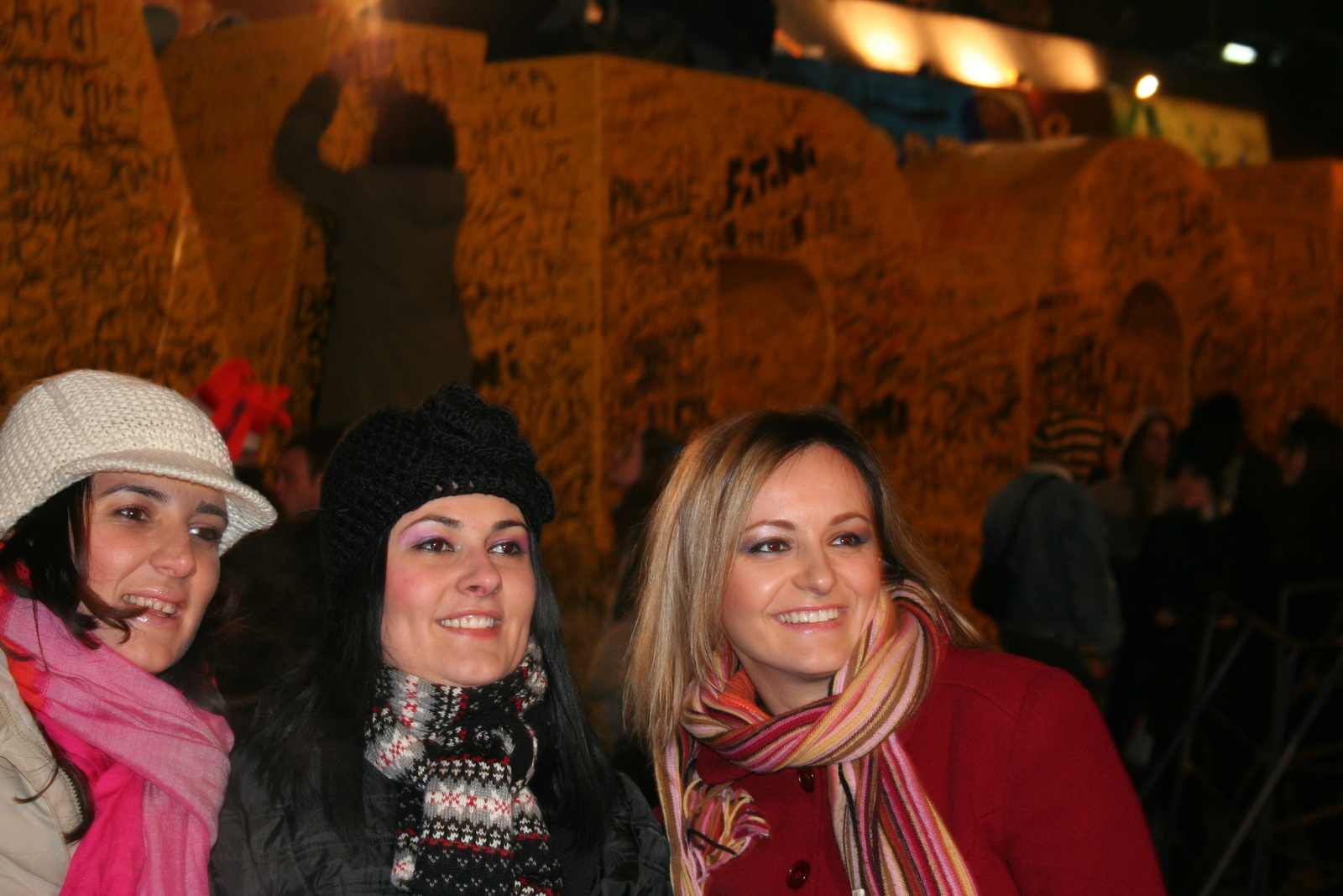 Kosovar Albanian women